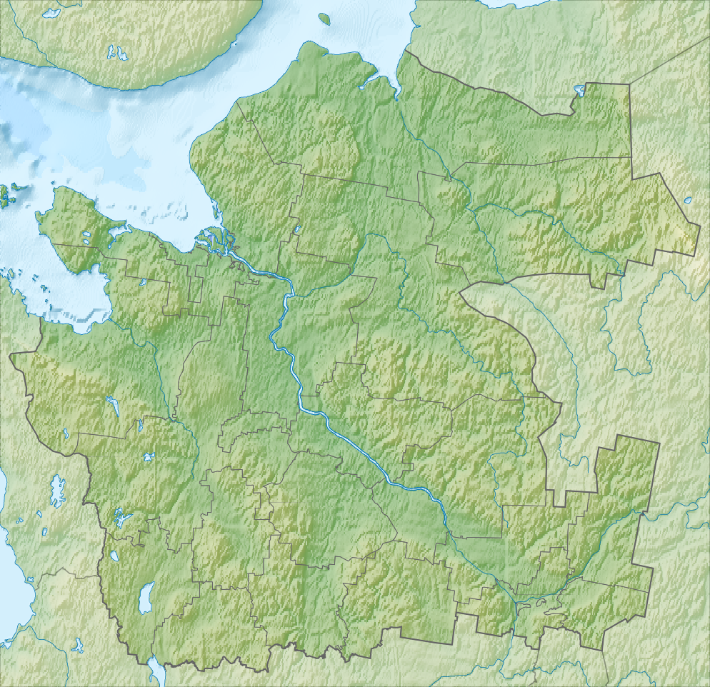 Физическая карта Архангельской области (только основная часть, без Ненецкого АО и островов. Проекция: Меркатор Координаты для GMT: -R35.7/50.7/60.5/66.9 Инструменты: GMT, Inkscape This map may be incomplete, and may contain errors. Don't rely solely on it for navigation.